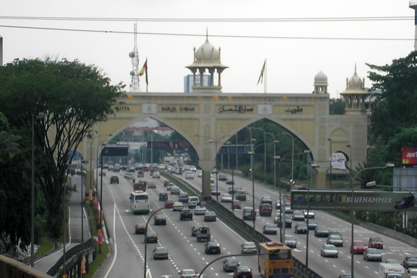 The Kota Darul Ehsan arch, bordering the Kuala Lumpur-Selangor border, Malaysia. Taken from a moving Kelana Jaya Line train.